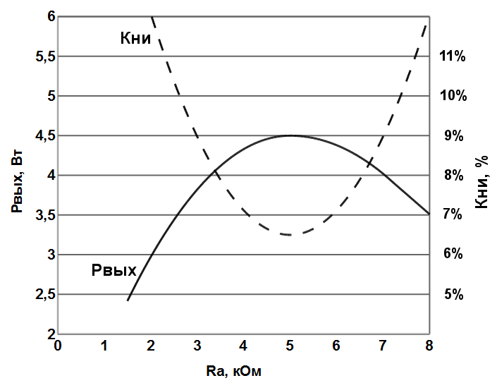 Выходная мощность и искажения пентода 6П14П в зависимости от сопротивления нагрузки. Ua=Uc2=250 В, Uc1=-6 В.